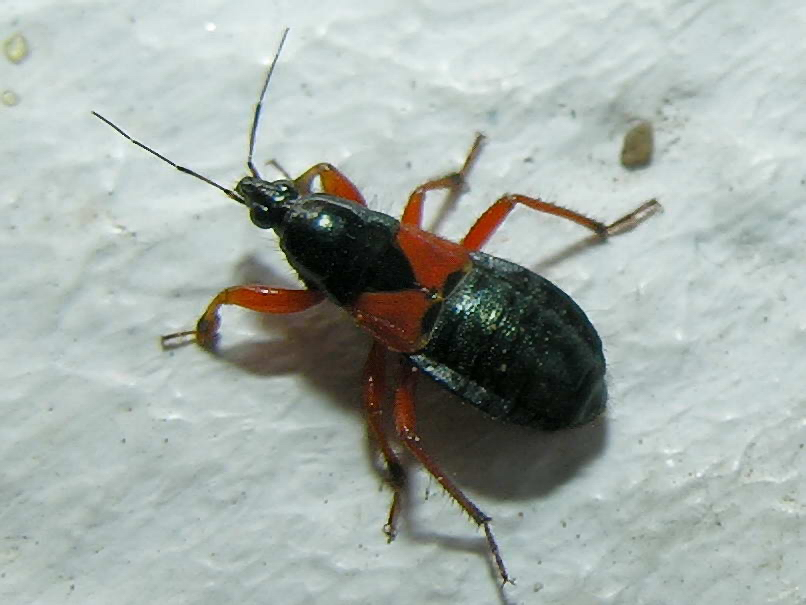 Nabidae, Prostemma guttula, (Bastavales, Brión, Galiza Publish by= Luis Miguel Bugallo Sánchez.